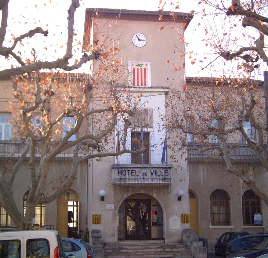 L'Hôtel de ville de la Bouilladisse (Bouches-du-Rhône)